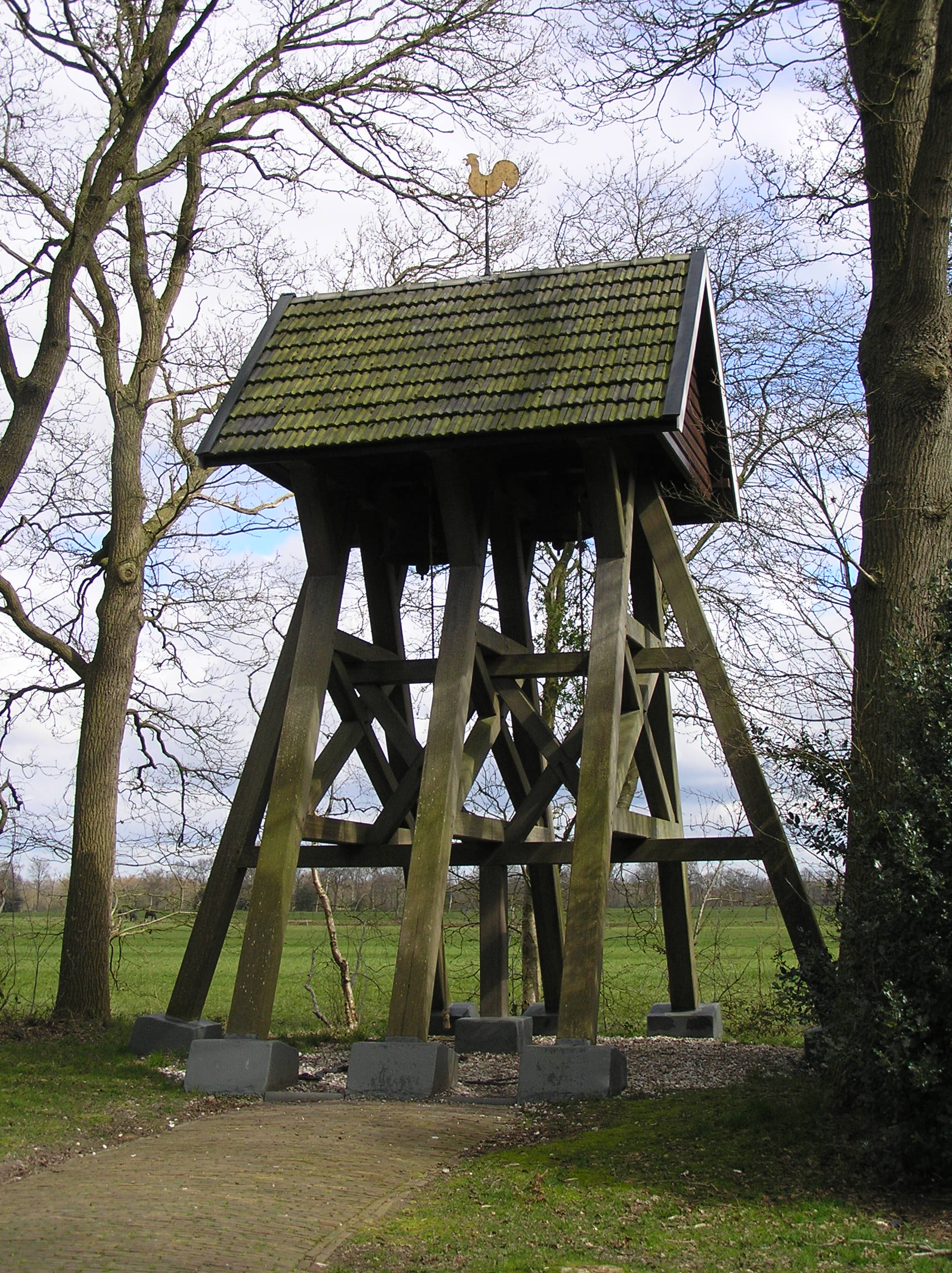 Vrijstaande klokkenstoek in Katlijk